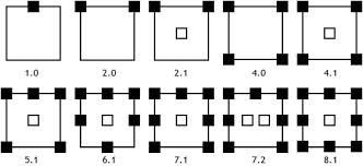 Tipos de sonido multicanal